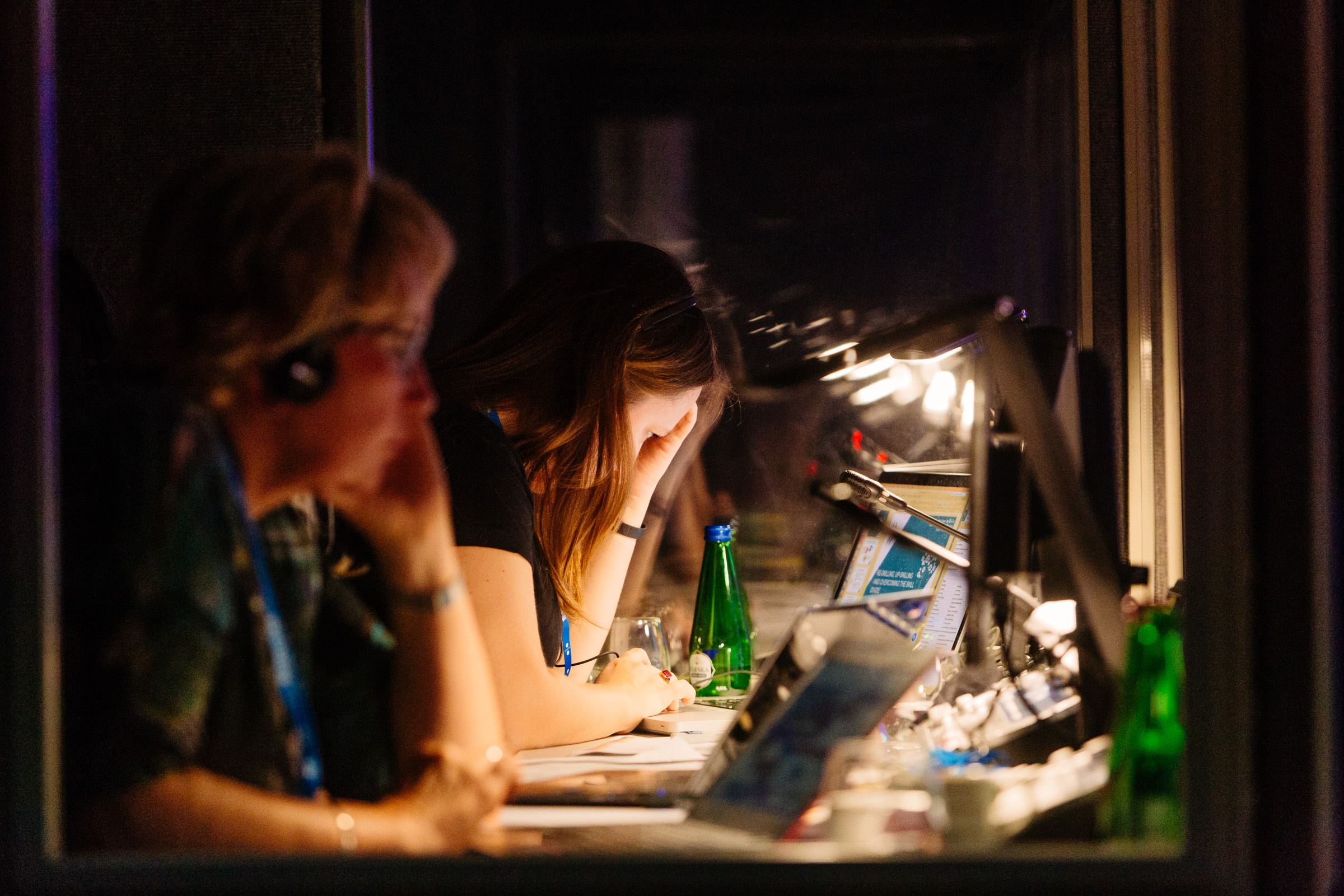 Photo: Arno Mikkor (EU2017EE)